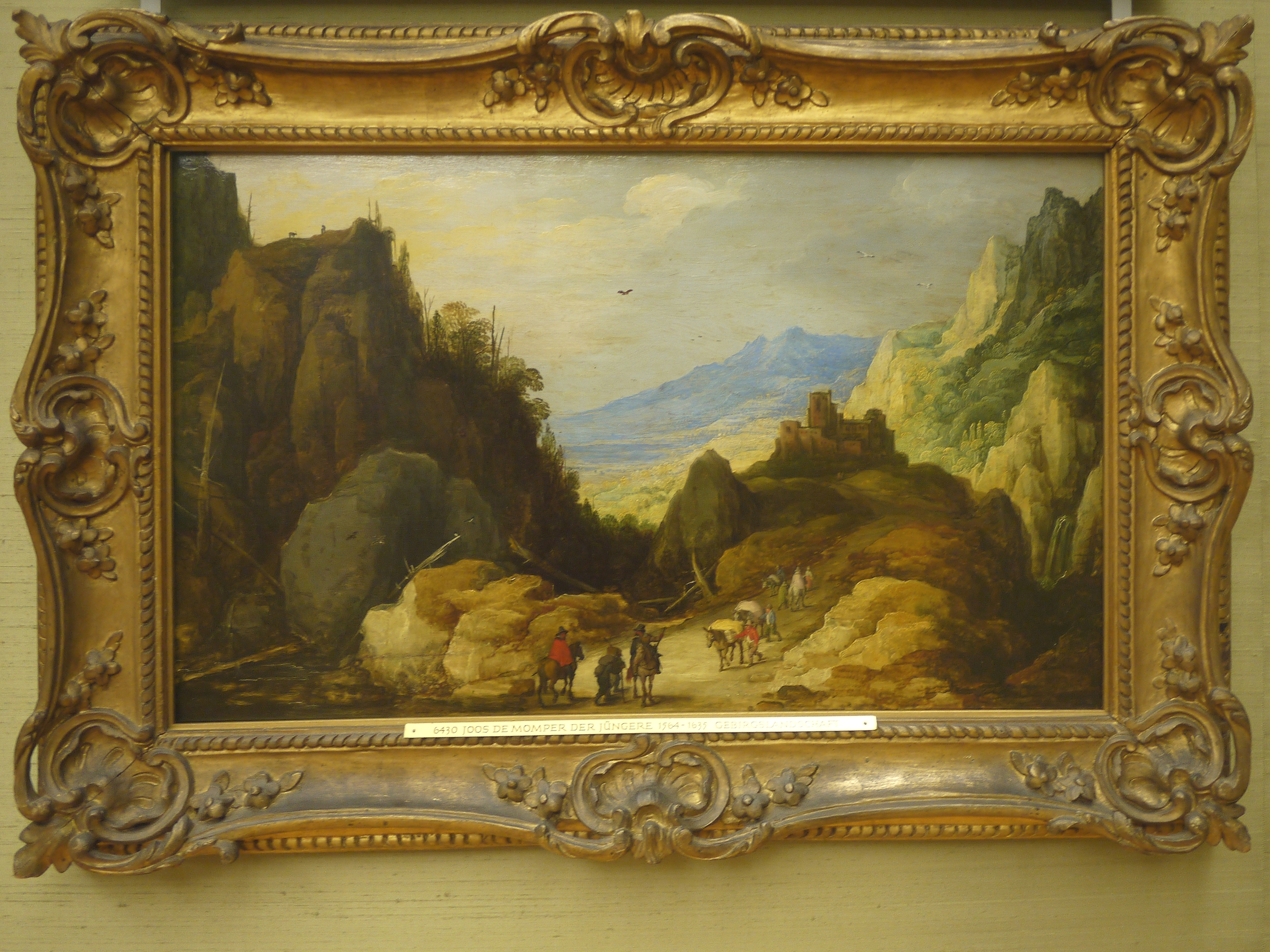 Mountain Landscapelabel QS:Lde,"Gebirgslandschaft"label QS:Len,"Mountain Landscape"